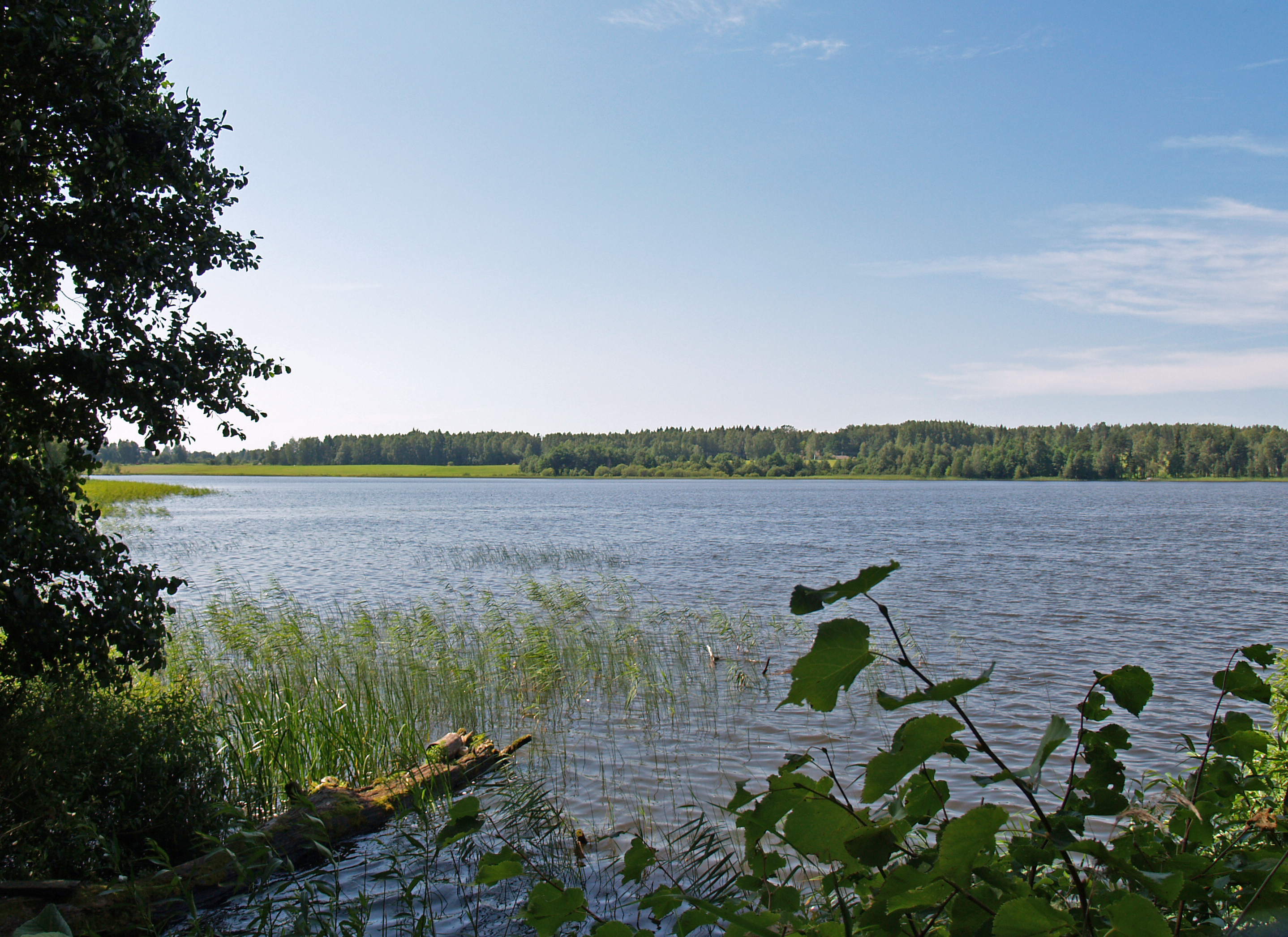 Katvaru ezers (Katvari lake)